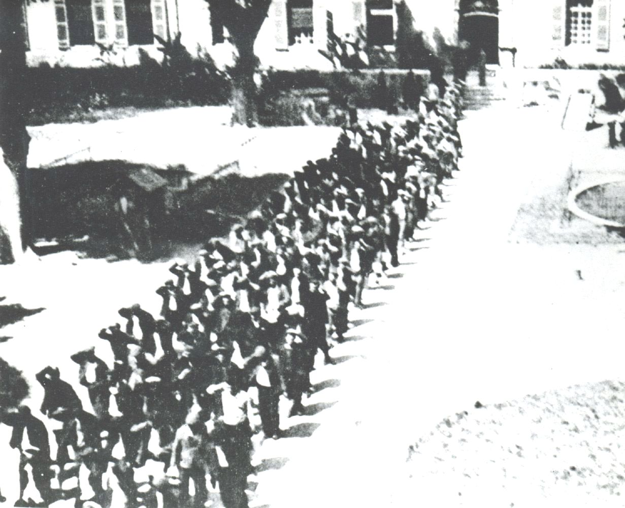 Unique photo, prise par un gardien, de la livraison aux nazis par les autorités françaises des 1200 résistants et patriotes emprisonnés dans la centrale d'Eysses. Les détenus résistants, mains sur la tête, traversent en colonne la cour d'honneur de la prison sur ordres des SS.